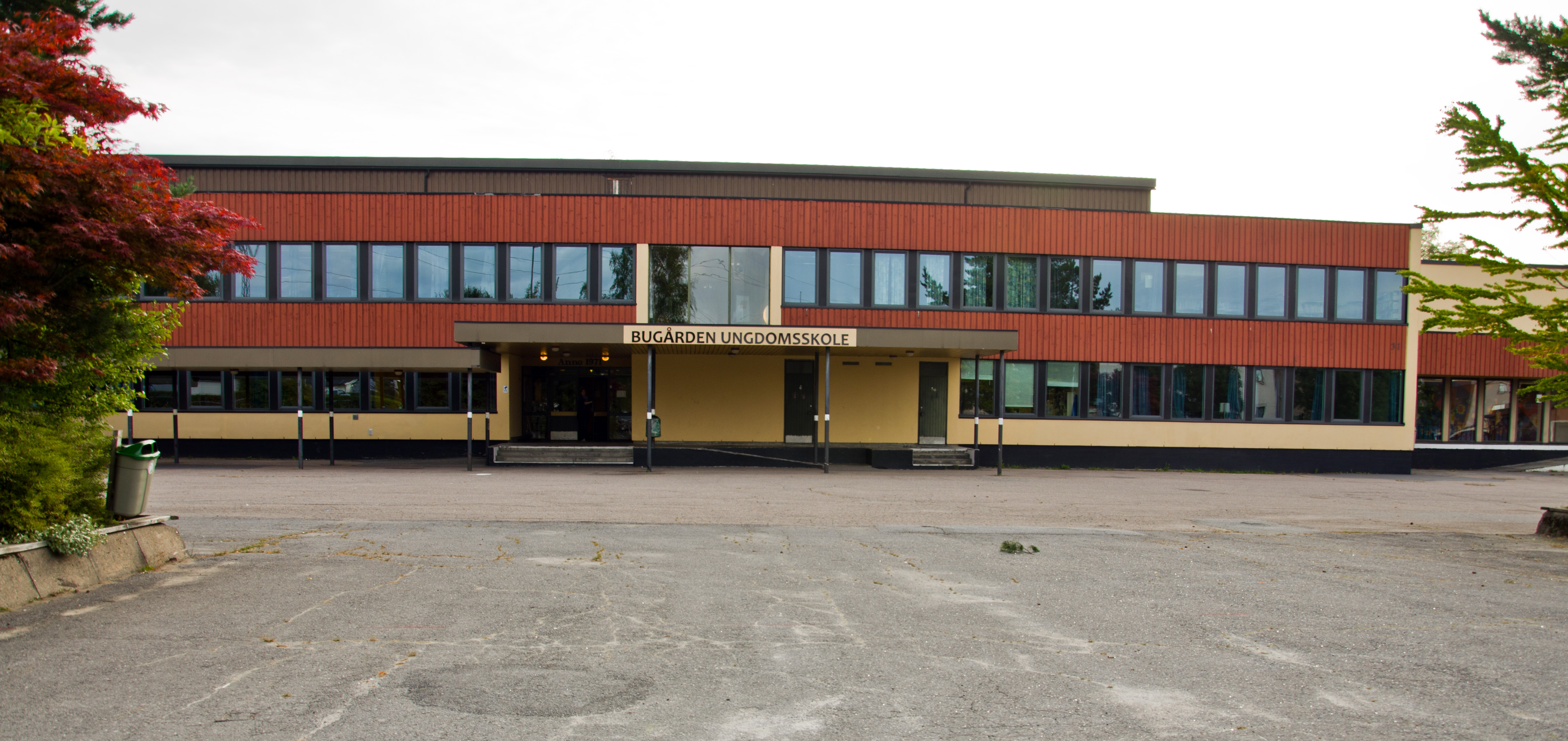 Bugården ungdomsskole i Sandefjord